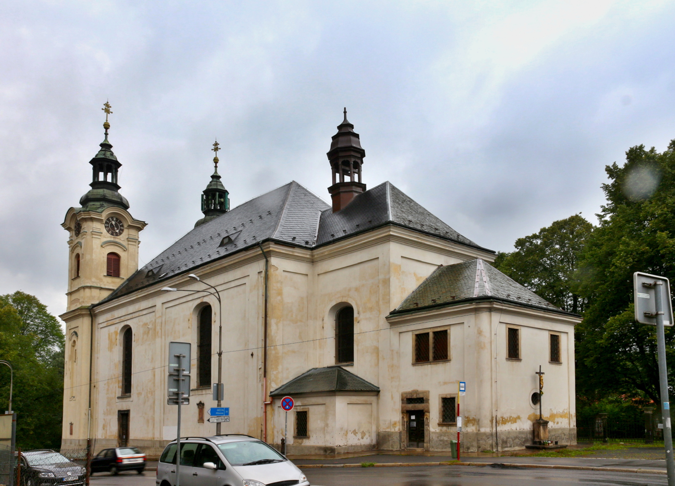 Liberecký kostel Nalezení sv. Kříže